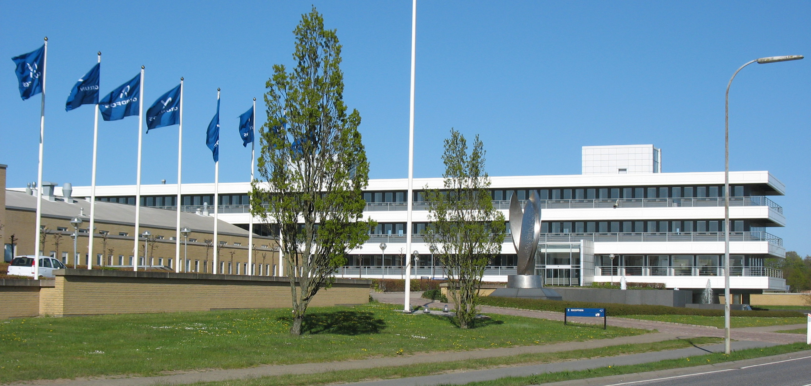 Sede Centrale della Grundfos a Bjerringbro, Danimarca.